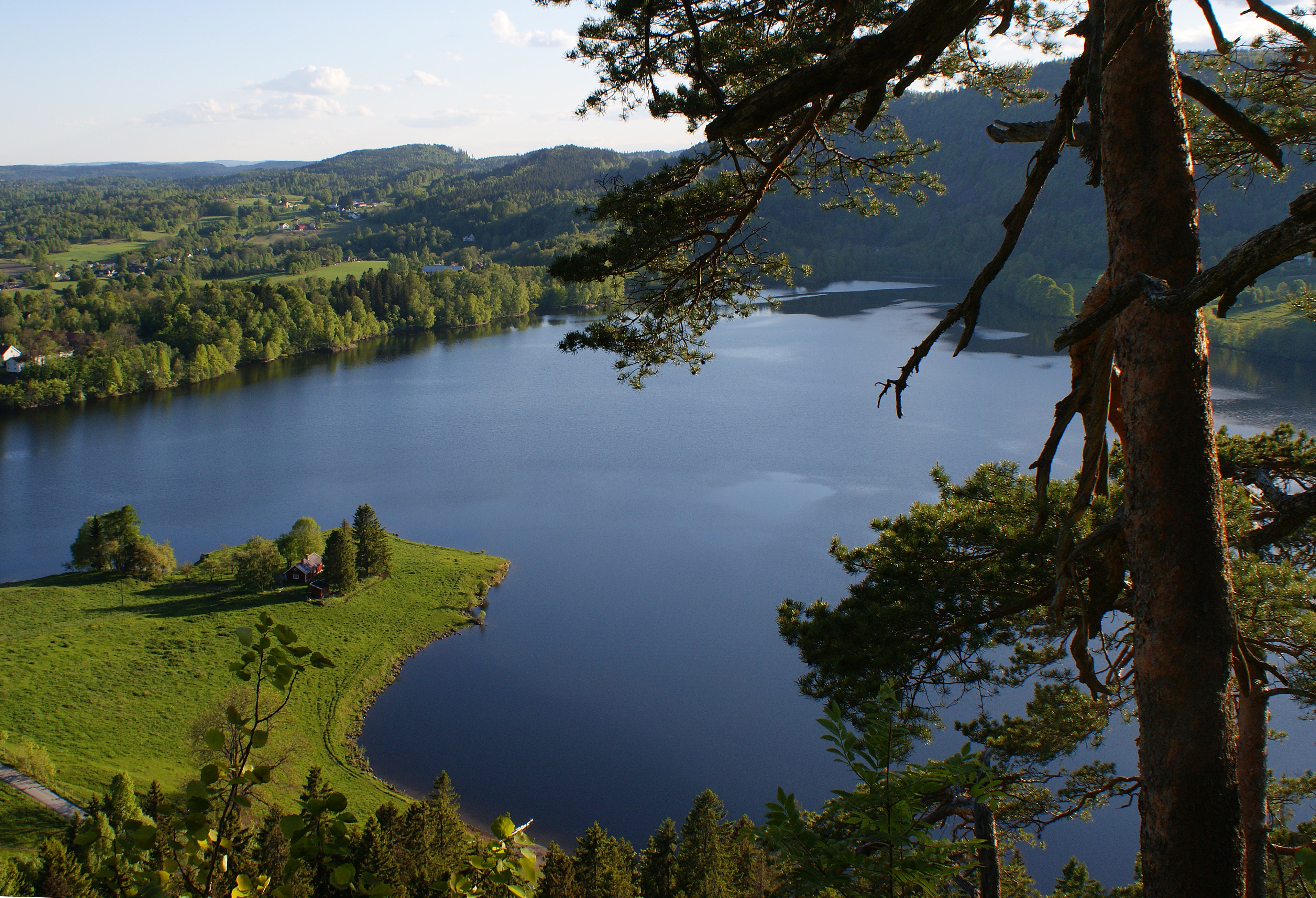 Semsvannet, Asker View On Black